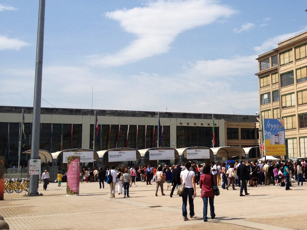 I botteghini.